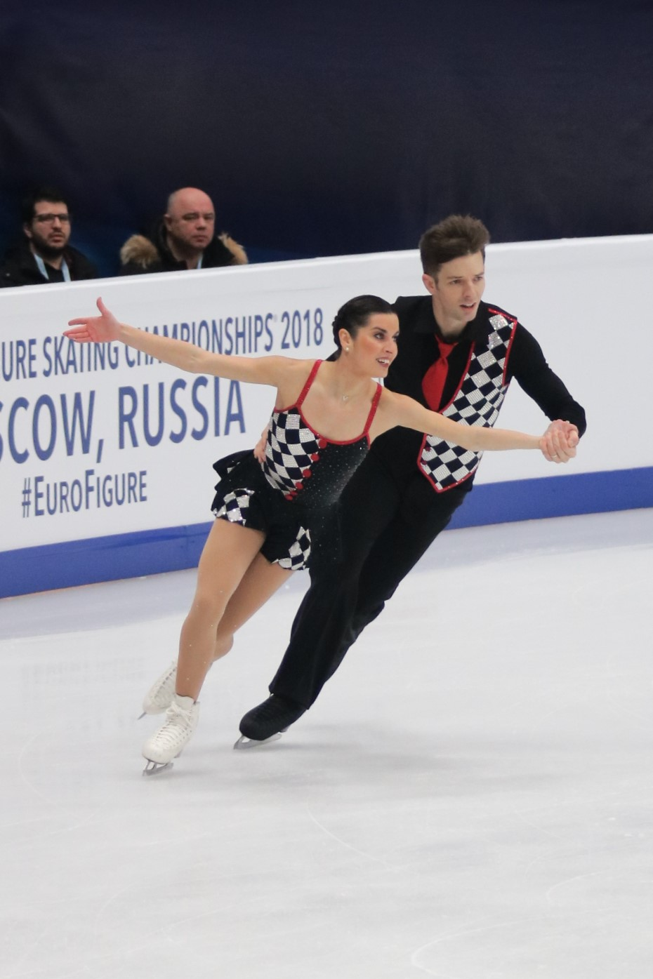 Валентина Маркеи / Ондржей Готарек (Италия) на Чемпионате Европы по фигурному катанию 2018.